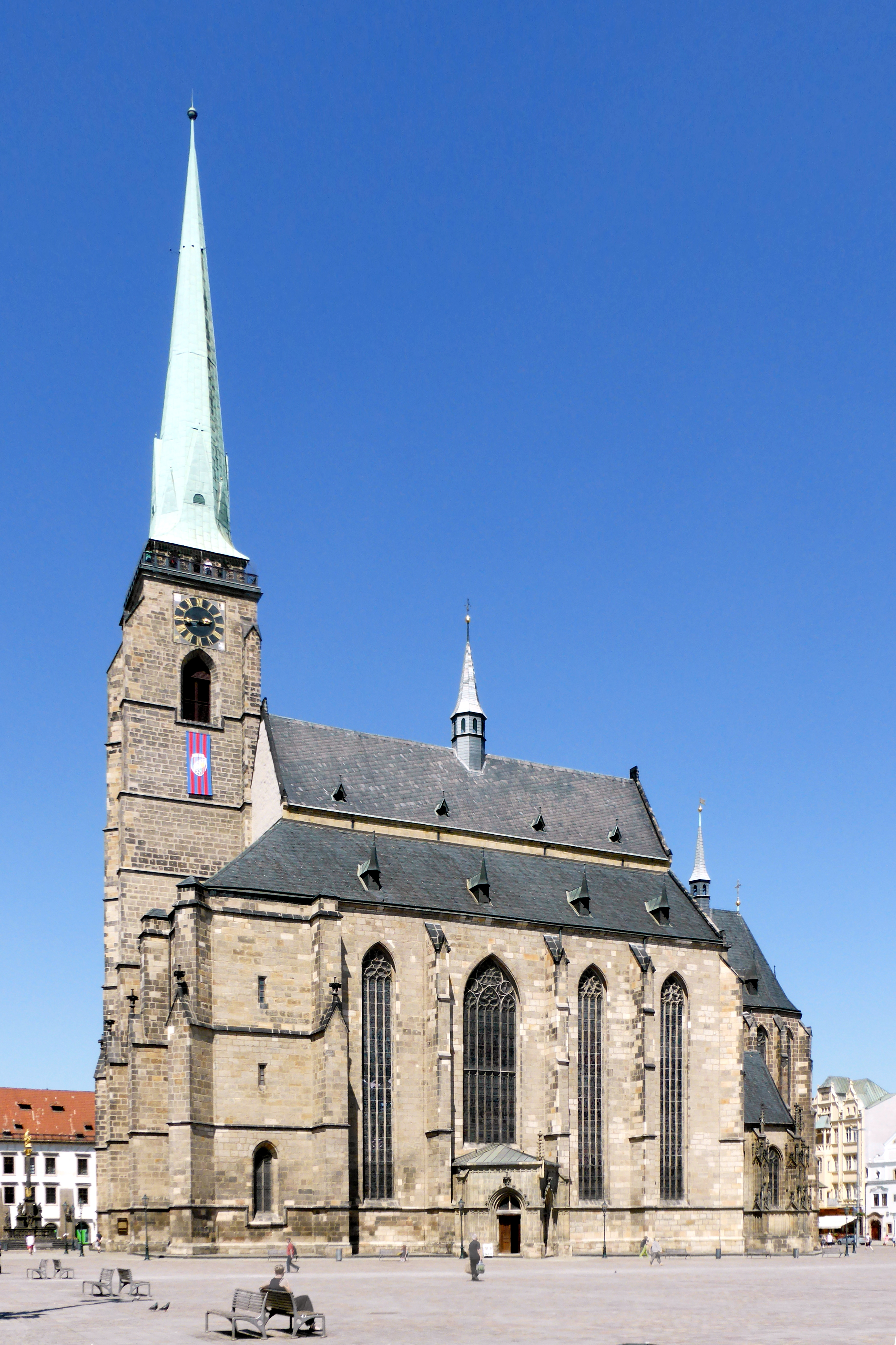 Katedrála svatého Bartoloměje v Plzní, pohled od jihu.